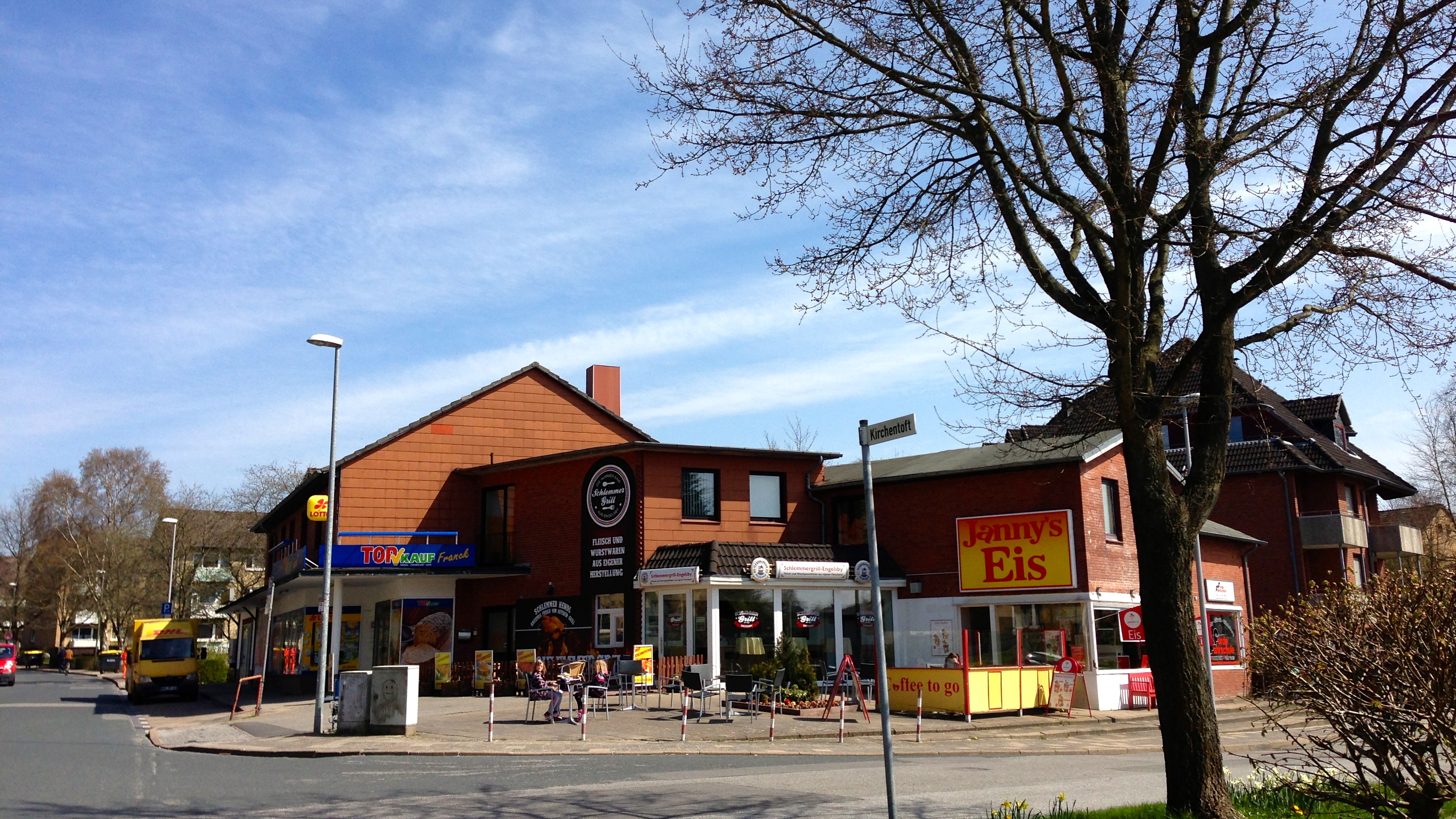 Flensburg - Engelsby mit Blick aus Kirchentoft auf die Richard-Wagner-Straße und Beethovenstraße in beiden Richtungen und auf der rechten Seite zu Janny's Eis, TopVerkauf Franck und dem Schlemmergrill Engelsby.